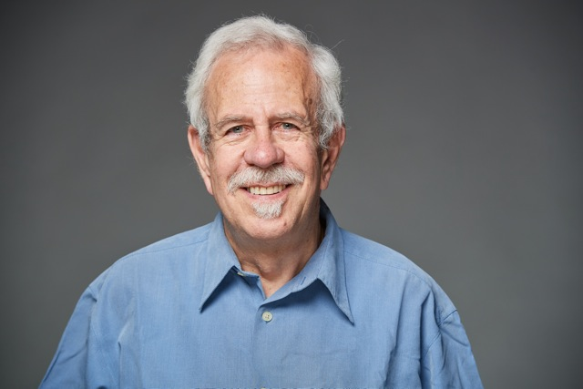 Portrait des Schweizer Musikers Alfred Felder (2019)